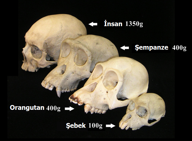 Original work under a Creative Commons Attribution License, by PLoS Biology Journal